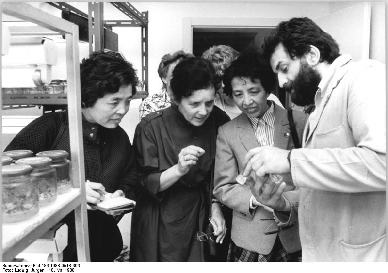 LPG Mühlhausen, Besuch einer chinesischen Delegation ADN-ZB Ludwig-pr-18.5.88-Erfurt: Eine Frauendelegation des Allchinesischen Frauenbundes unter Leitung des Mitglieds des Exekutivkomitees Zhang Xiaolan (2.v.r.) besuchte im Mai d.J. Einrichtungen der LPG (P) "Thomas Müntzer" Mühlhausen. Laborleiter Michael Liebau (r) informierte über Verfahren der Zellvermehrung. Links: Zhang Quingfang.